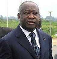 Ivorian President Laurent Gbagbo, 2007